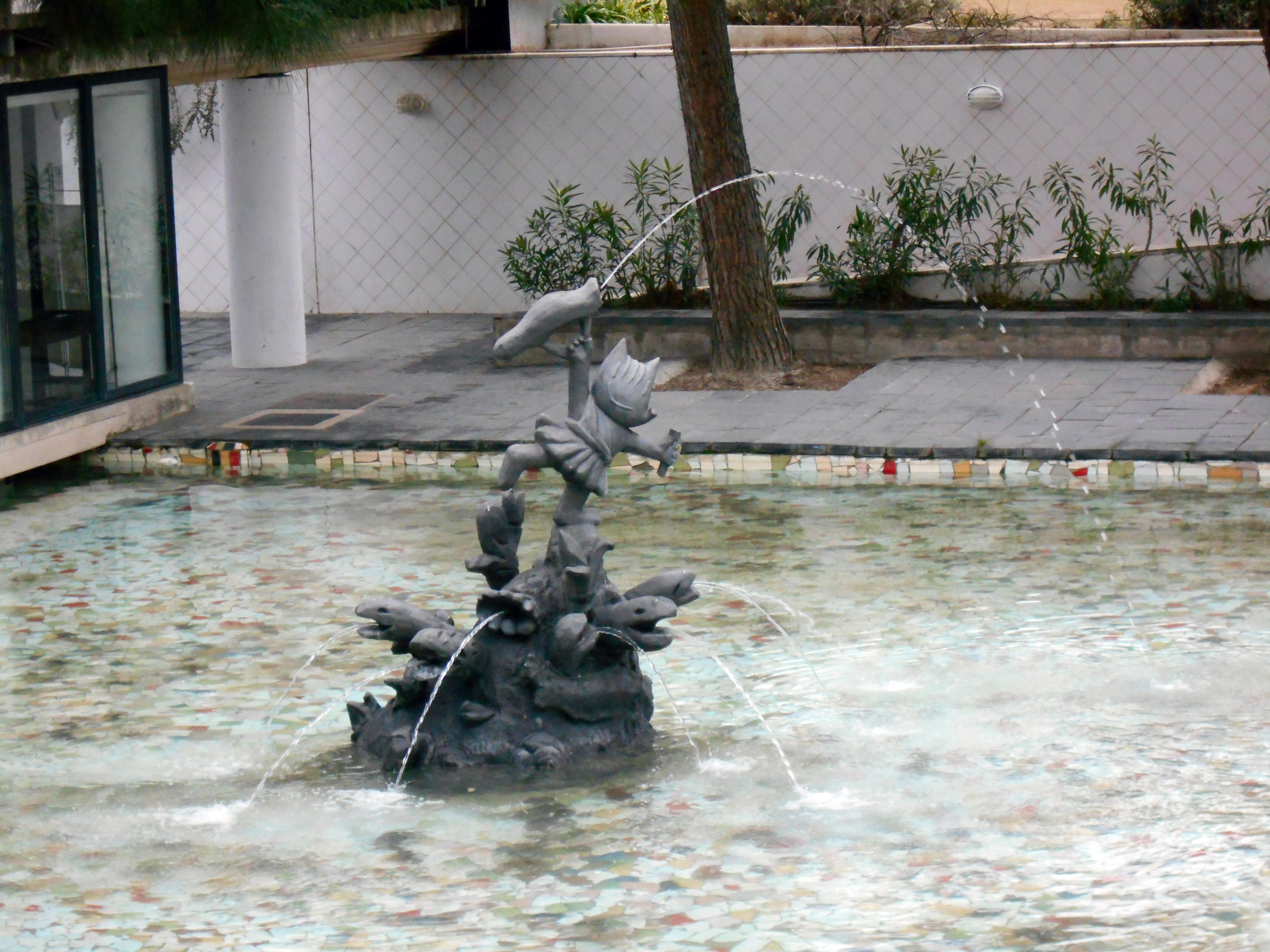 Estanque de Cobi (Javier Mariscal).